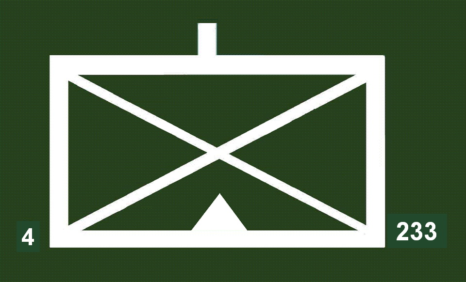 4./GebJgBtl233